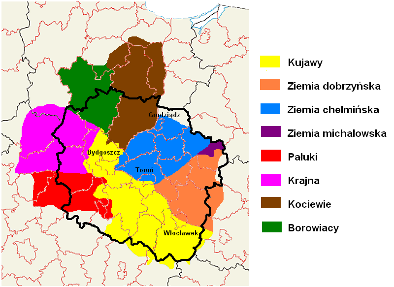 Krainy historyczne i etnograficzne w województwie kujawsko-pomorskim. Opracowane m.in. na podstawie następujacych źródeł: Guldon Zenon: Podziały administracyjne Kujaw i ziemi dobrzyńskiej w XIII-XIV wieku: Warszawa Poznań Państwowe Wydawnictwo Naukowe 1974; Biegański Zdzisław: Kształt terytorialno-administracyjny regionu kujawsko-pomorskiego w XIX i XX wieku. [w:] Prace Komisji Historii Bydgoskiego Towarzystwa Naukowego. T. XVII. Związki Kujaw i Pomorza na przestrzeni wieków. Zbiór studiów pod red. Zdzisława Biegańskiego i Włodzimierza Jastrzębskiego; Szkulmowska W. (red.): Sztuka ludowa Kujaw przeszłość i teraźniejszość: Bydgoszcz 1997; Kukier Ryszard: Regionalizacja etnograficzna Kujaw: Prace komisji historii BTN: Państwowe Wydawnictwo Naukowe oddział w Łodzi 1963; Sztuka ludowa Pałuk przeszłość i teraźniejszość: Bydgoszcz 2006; Janusz Umiński: Pojezierze Krajeńskie: Warszawa 1991; Ziemia Chełmińska w przeszłości: wybór tekstów źródłowych, pod red. Mariana Biskupa Toruń 1961; Dzieje Pomorza Nadwiślańskiego od VII wieku do 1945 roku: Gdańsk 1978